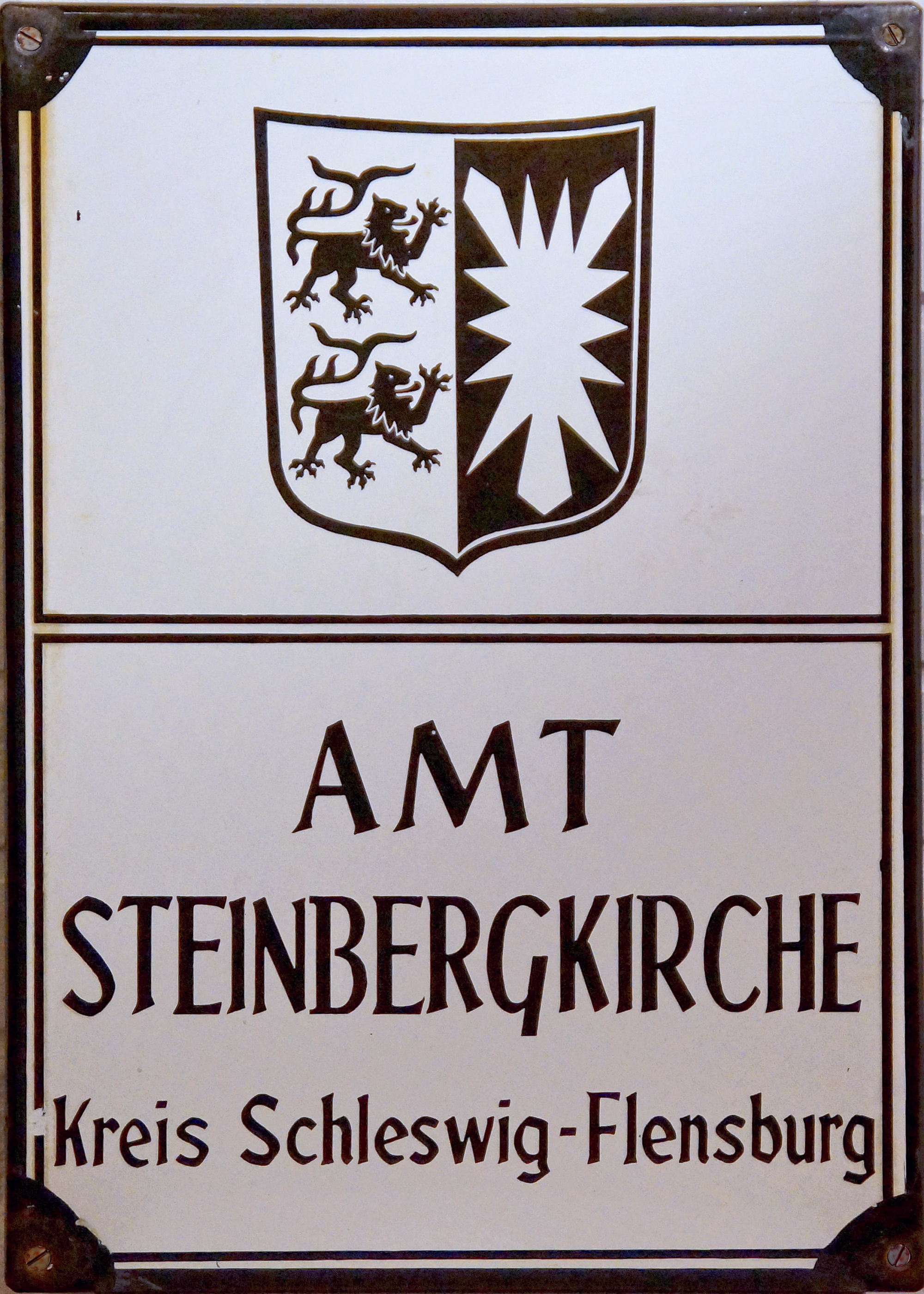 Steinbergkirche Schild Amtsschild Amt Steinbergkirche bis 31 12 2007 Foto Wolfgang Pehlemann DSC00613